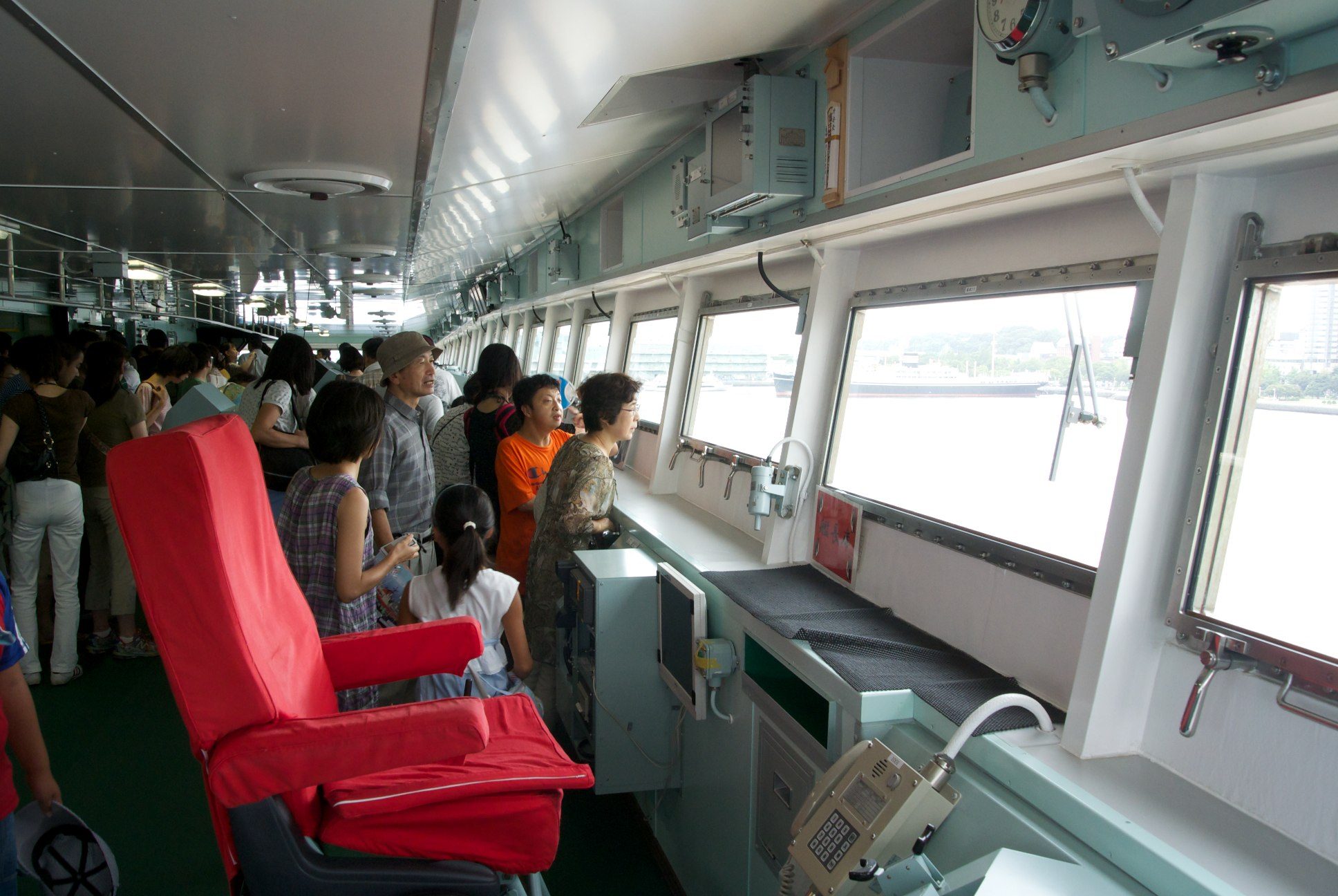 南極観測船しらせの艦橋。手前が艦長の椅子。横浜・大桟橋での艦内見学会にて。